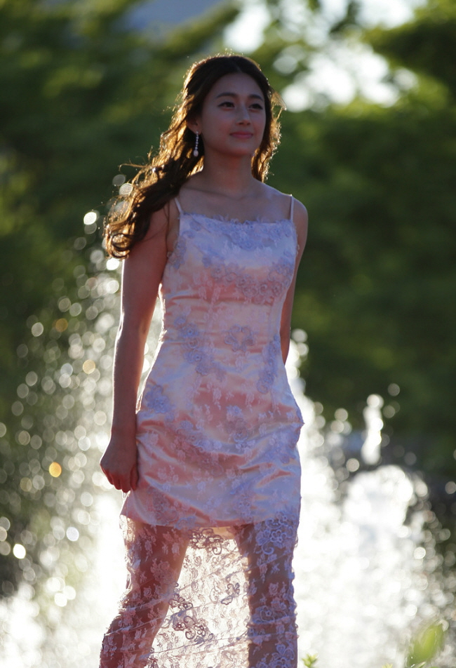 제19회 부천국제판타스틱영화제 개막식 레드카펫 part.2